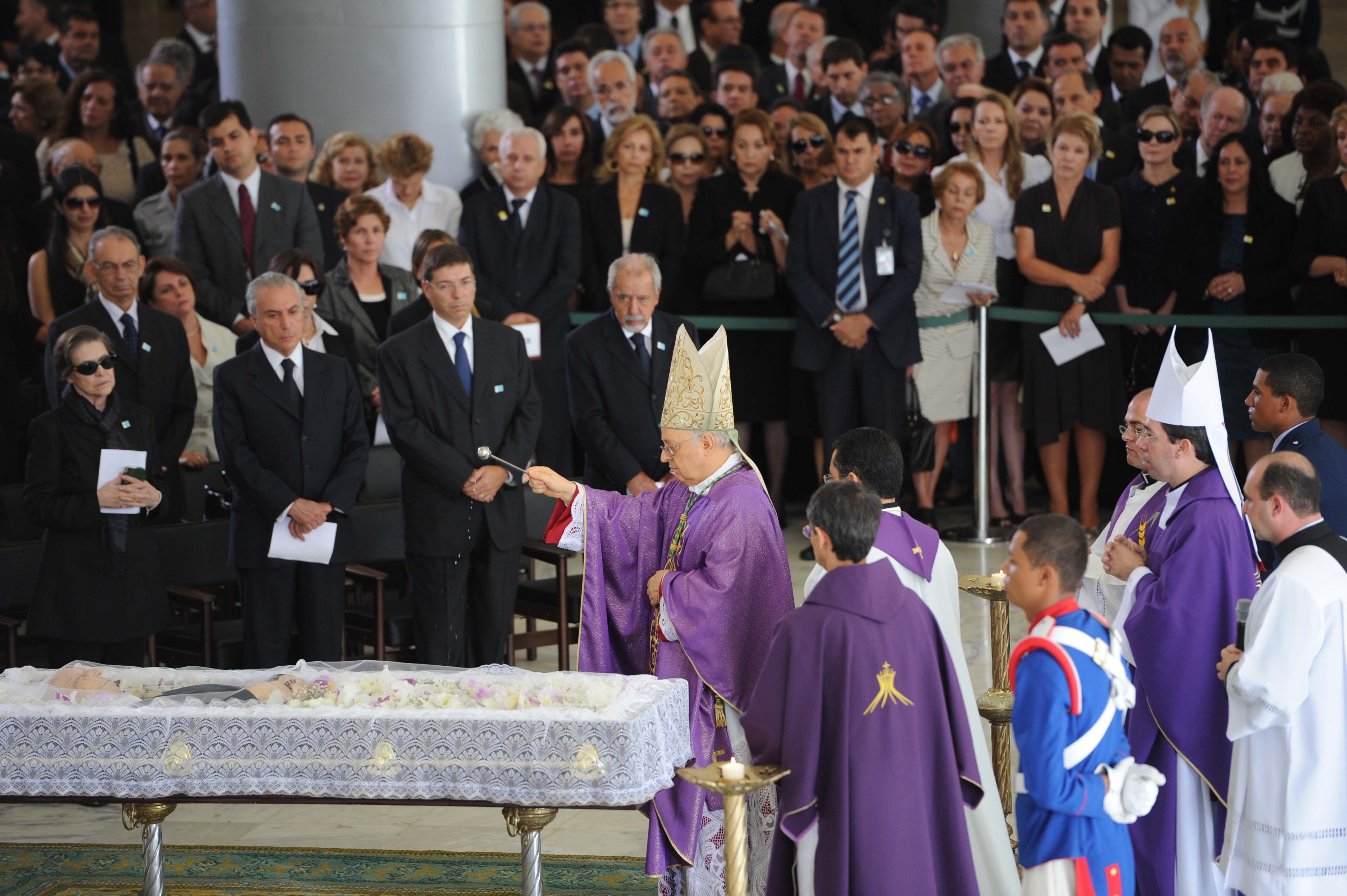 Velório do ex-vice-presidente José Alencar no Palácio do Planalto. Missa de corpo presente é celebrada pelo núncio apostólico no Brasil, Dom Lorenzo Baldisseri. Autoridades e familiares participam do velório. Foto: Paulo H. Carvalho/Agência Senado